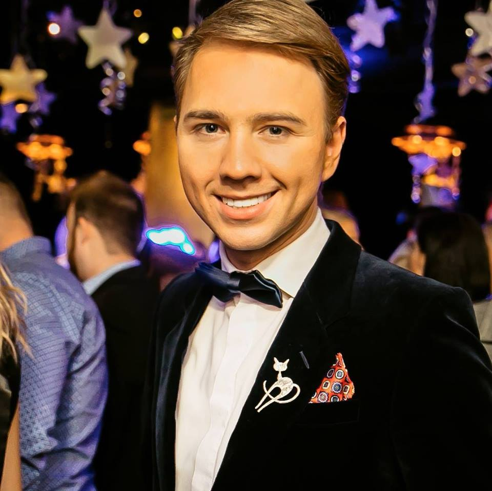 Smeninio archyvo nuotrauka